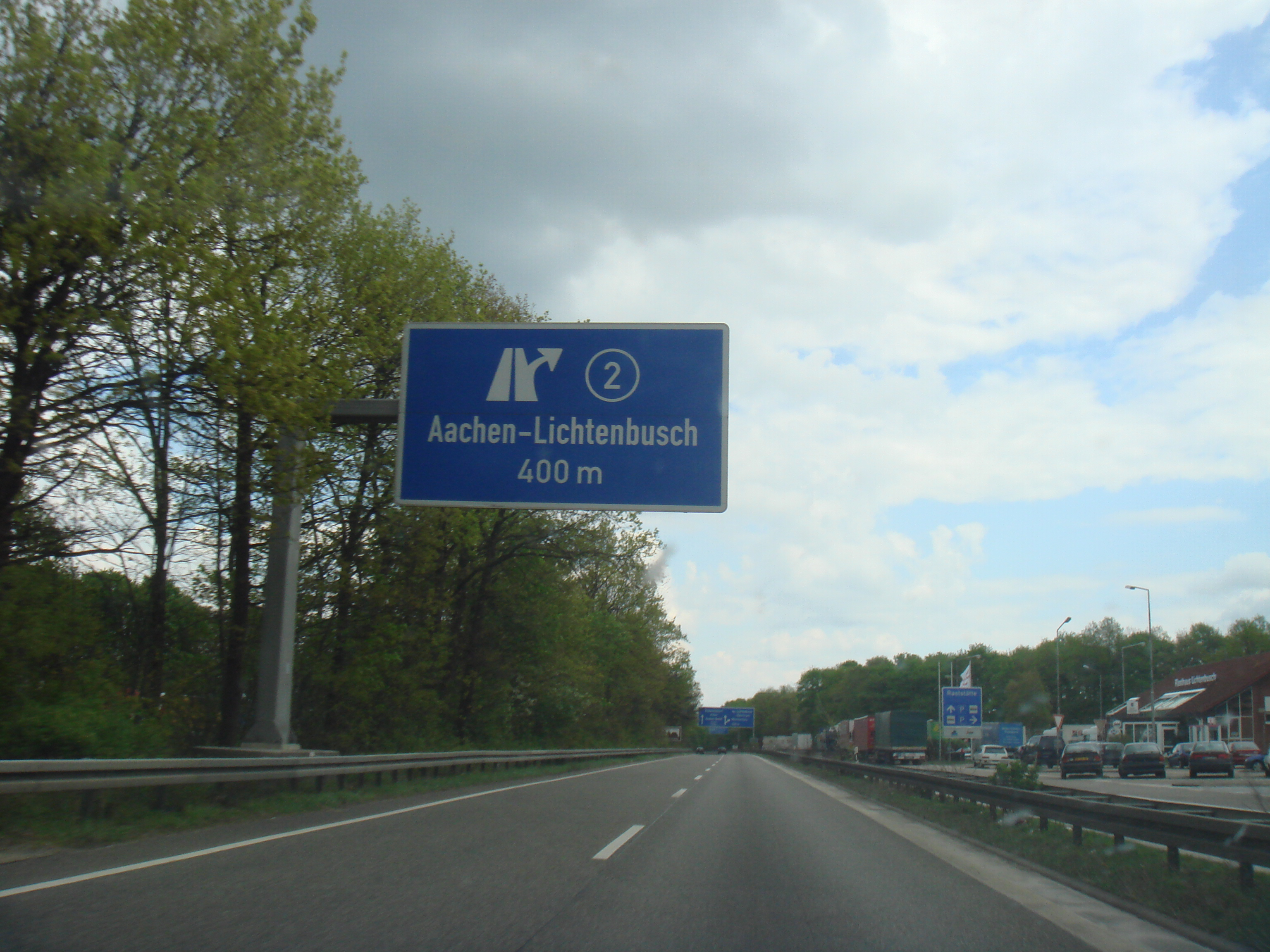 L'autoroute allemande 44 au niveau de la sortie 2